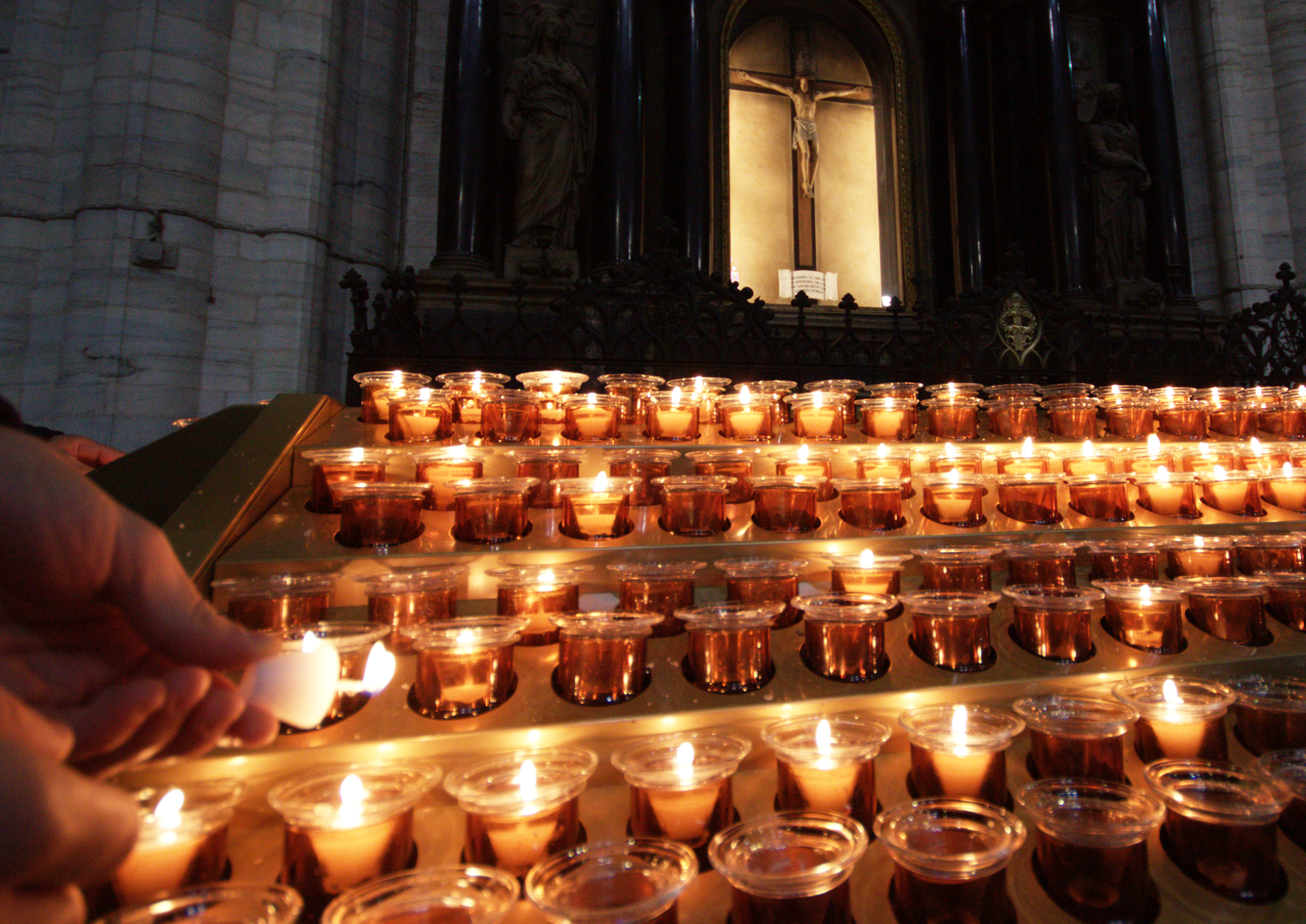 Accensione di una candela votiva all'interno del Duomo di Milano